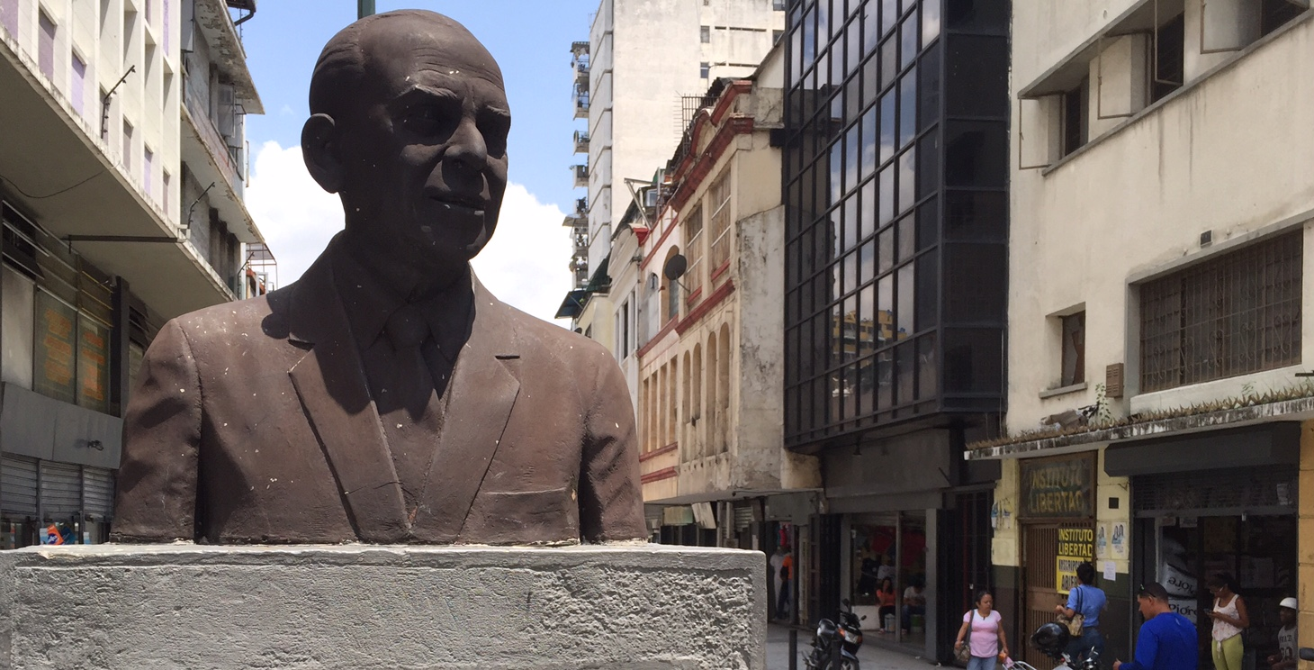 Busto del músico y compositor dominicano radicado en Venezuela, Billo Frómeta, en el centro de Caracas.